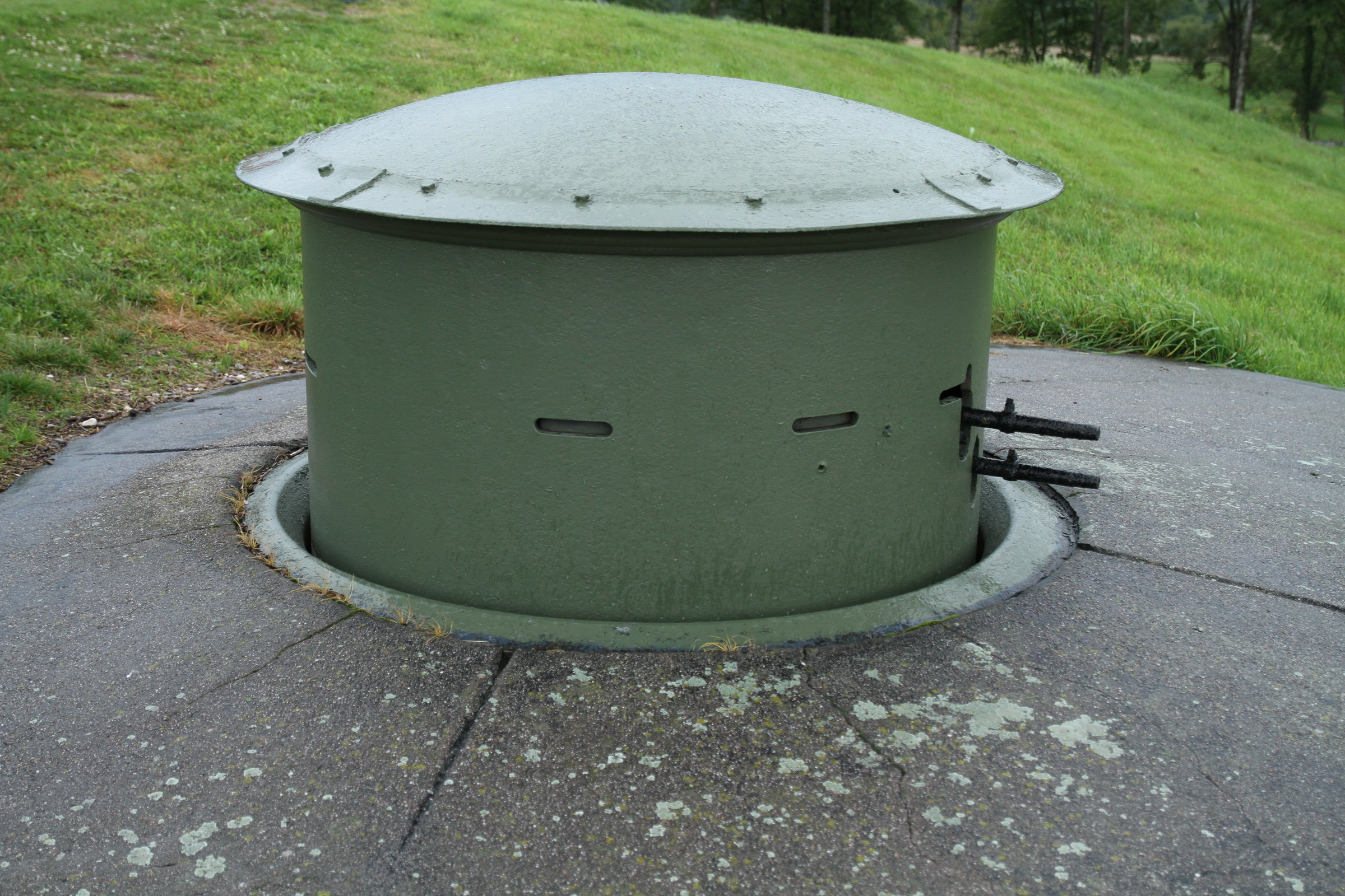 une mitrailleuse